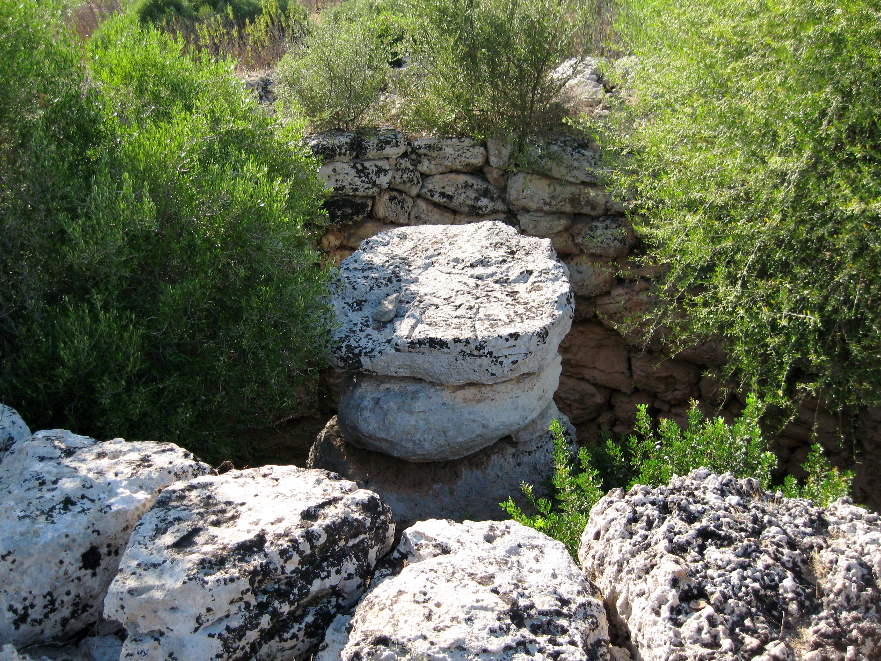 Runder Talayot sa Clova des Xot (Talaiot de sa Canova) auf dem Landgut sa Canova de Morell in der Gemeinde Artà, Mallorca, Spanien